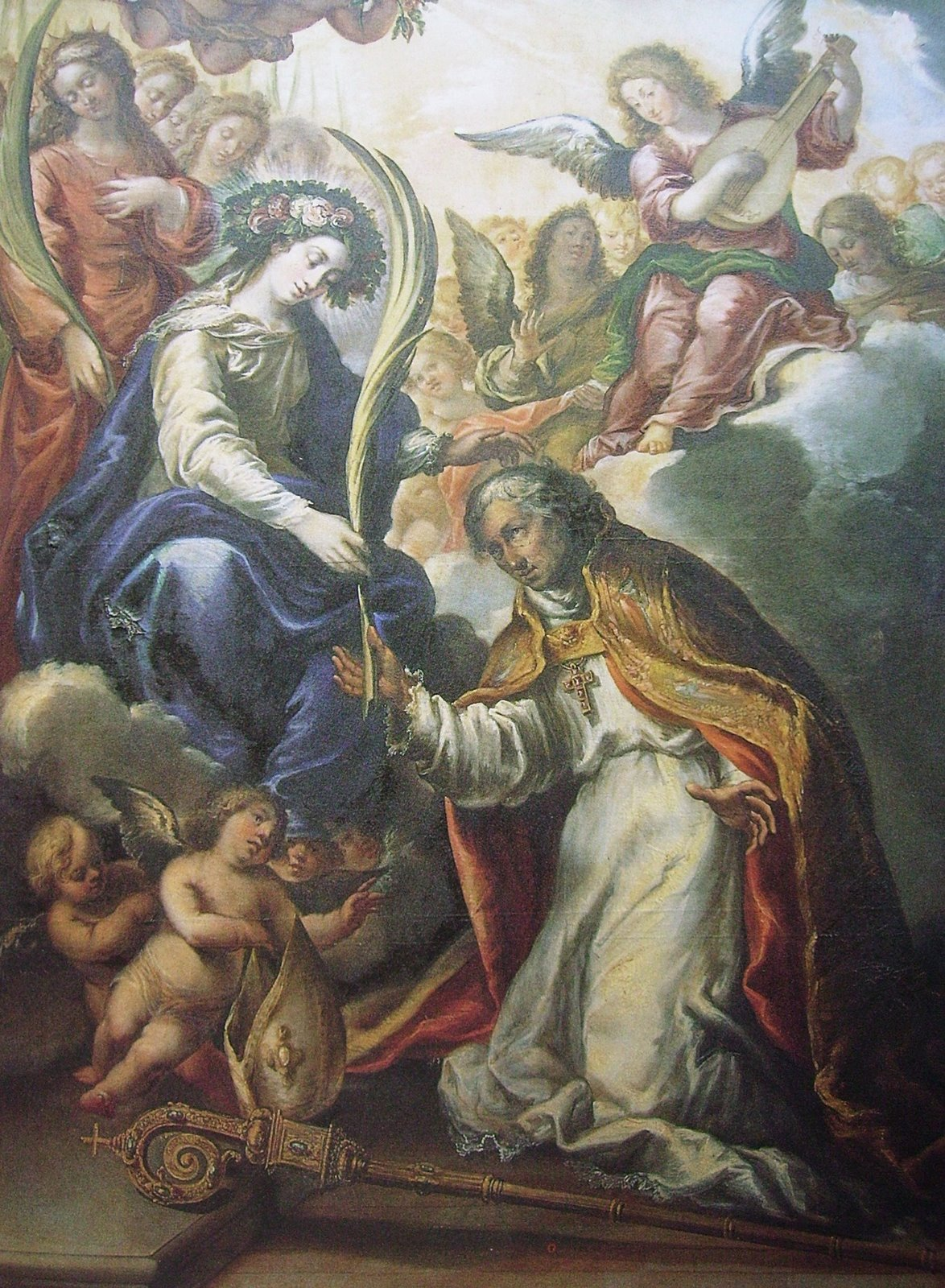 La obra representa a la Virgen María entregando la palma al obispo San Julián de Cuenca.